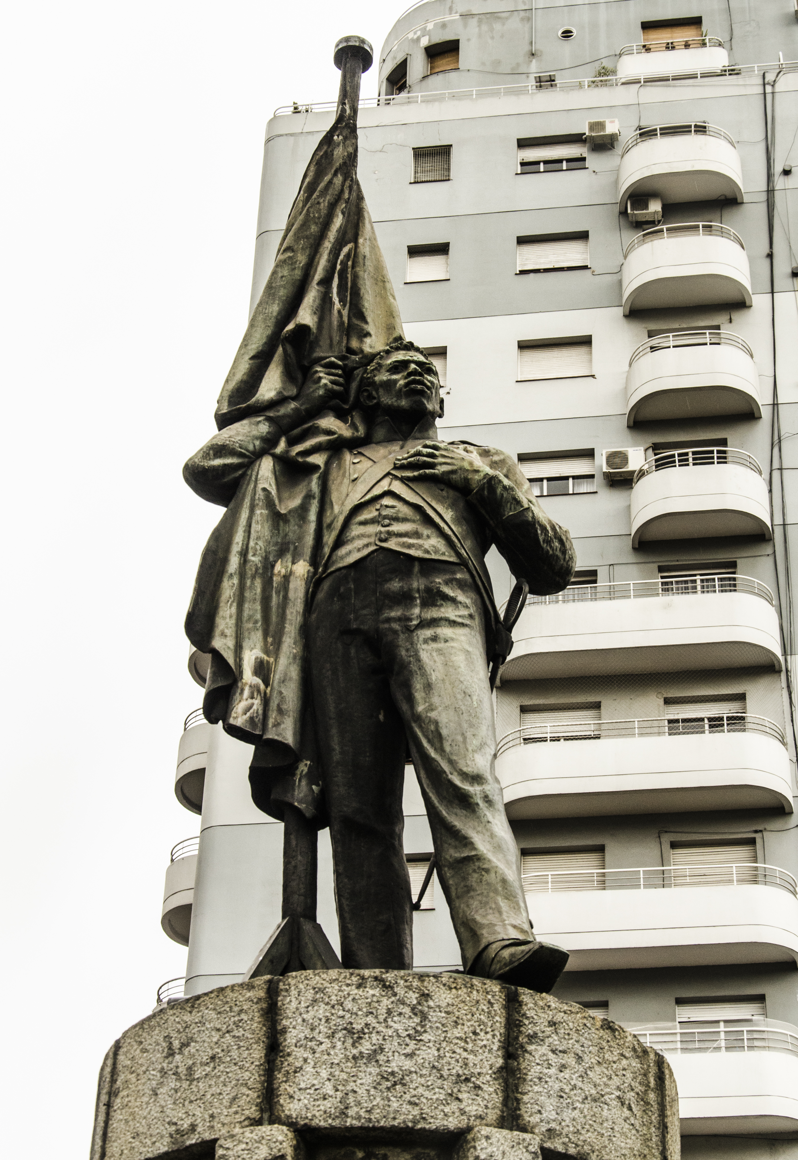 Homenaje a Falucho